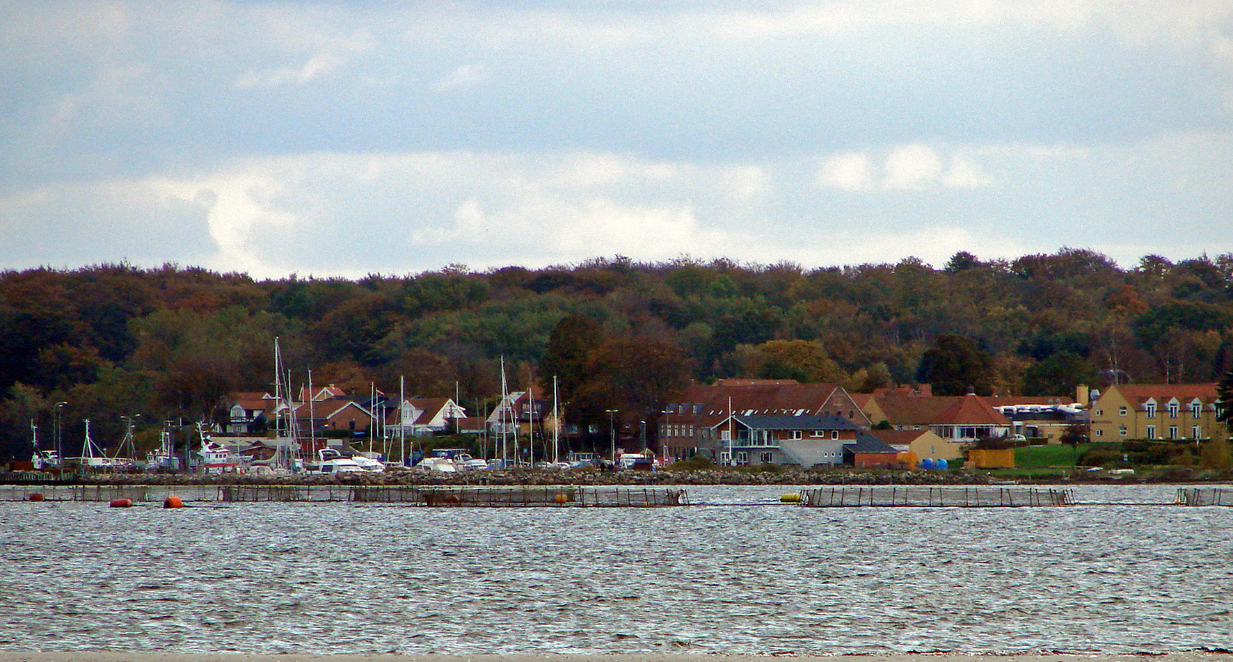 Snaptun ved Horsens Fjord set fra Alrø